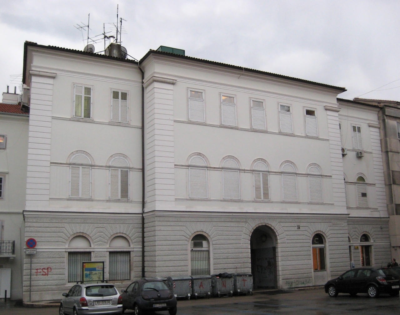 Zgrada Radio Rijeke